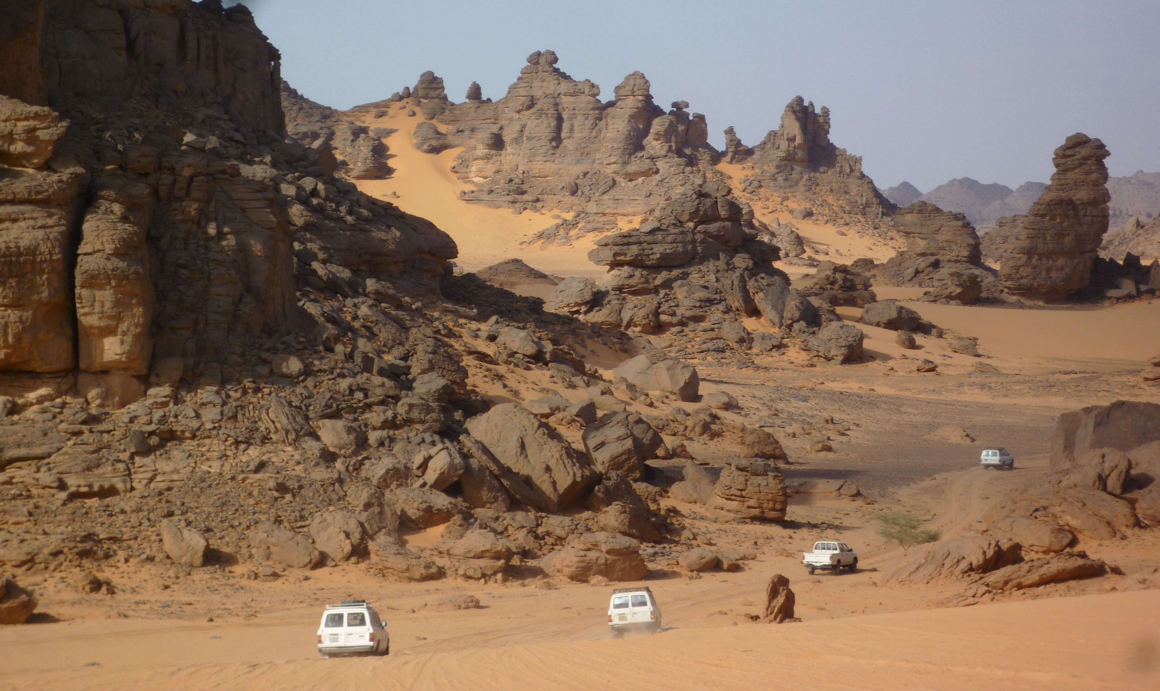 Akakus-Gebirge - Jeep-Safari